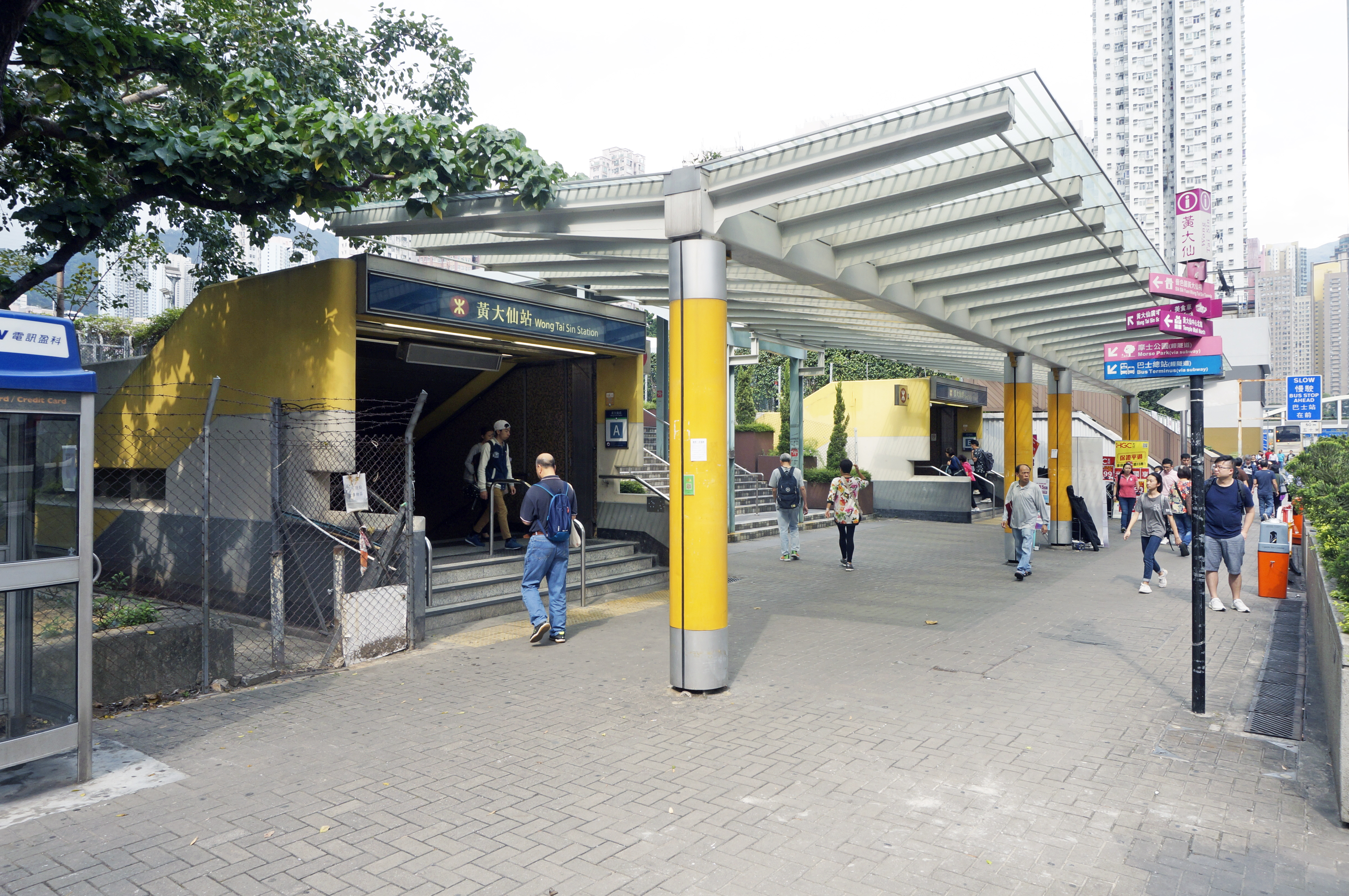 港鐵黃大仙站A及E出入口外貌